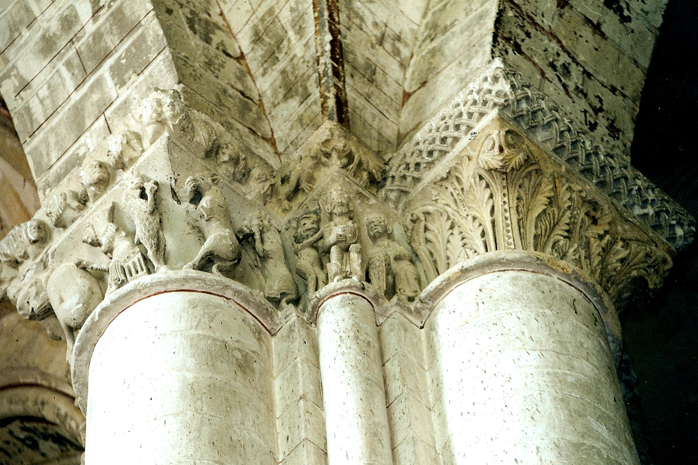 N.-D. Cunault, Menschliche u. tierische Plastik, Vierbeiner hoch aufgerichtet